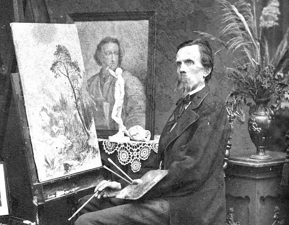 Ernst Gustav Doerell (1832 - 1877), Český malíř.